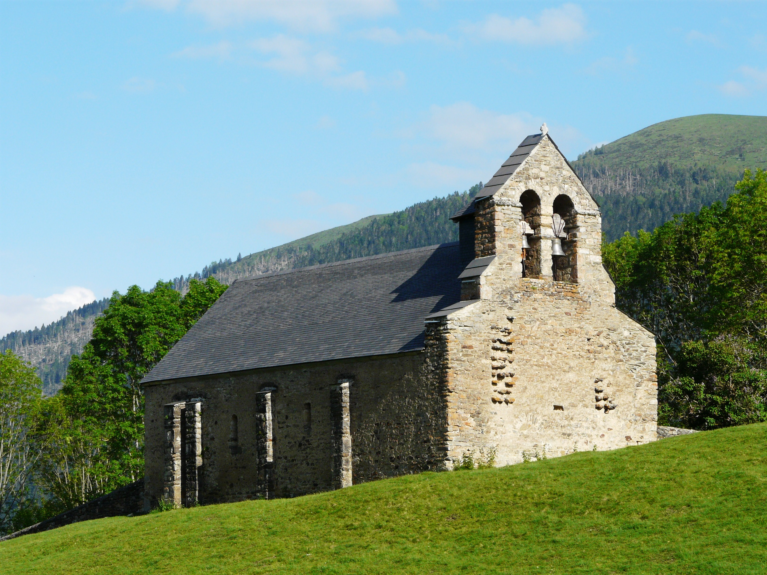 La chapelle Saint-Pé de la Moraine (ou chapelle de Saint-Tritous) au lieu-dit Saint-Tritous, Garin, Haute-Garonne, France.